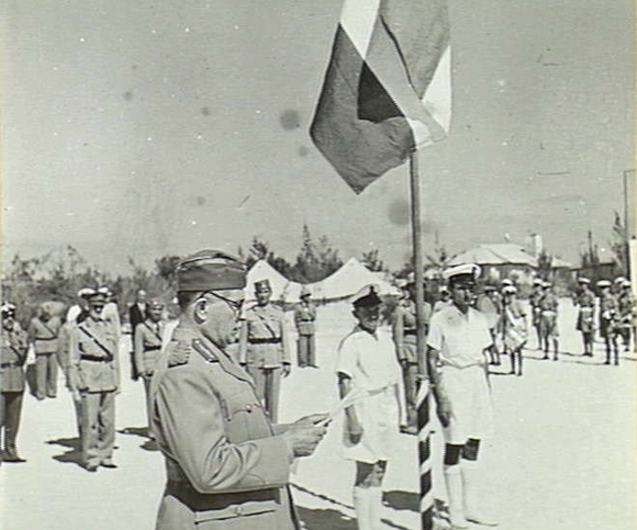 General Bogoljub Ilič med govorom na prisegi prostovoljcev jugoslovanskega kraljevega gardnega bataljona.